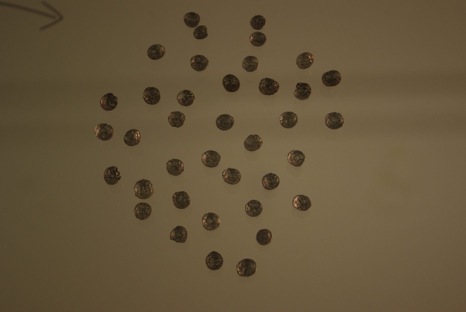 Alte Reichenhaller Münzen im Heimatmuseum in Bad Reichenhall